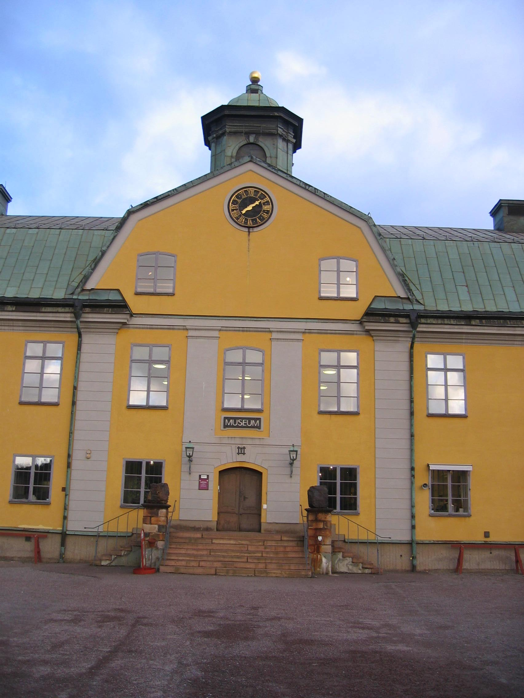 Gruvmuseet i Falun, 2006